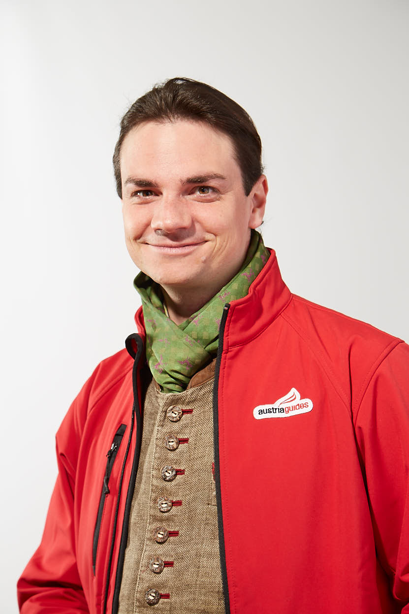 Sebastian Frankenberger als austriaguide